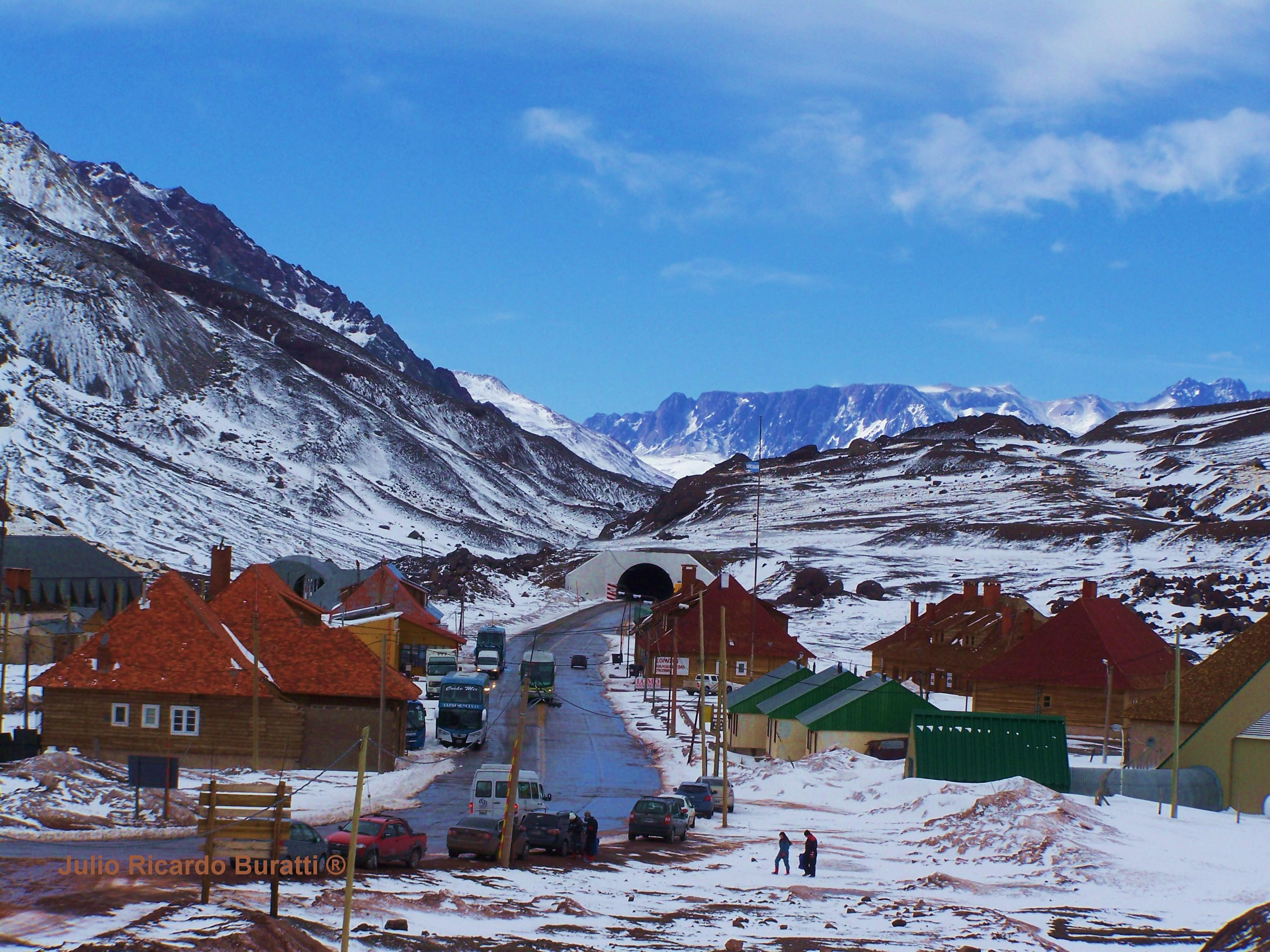 Localidad fronteriza Las Cuevas, Mendoza. Argentina.